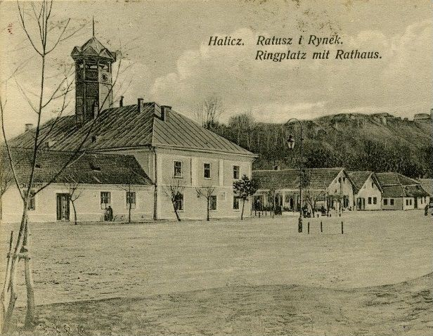 Halych townhall